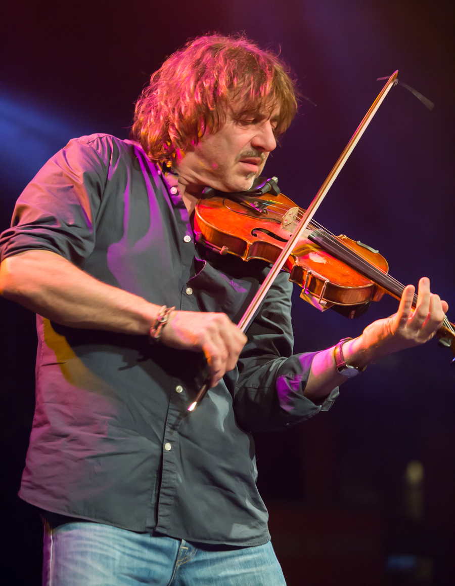 Mani Neumann bei einem Konzert von Farfarello in der Harmonie, Bonn